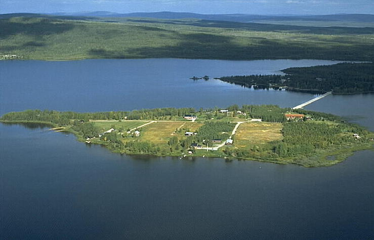 Motiv: Purkijaur Nyckelord: Flygbilder, Riksintressen Kategori: Insjömiljöer Purkijaur